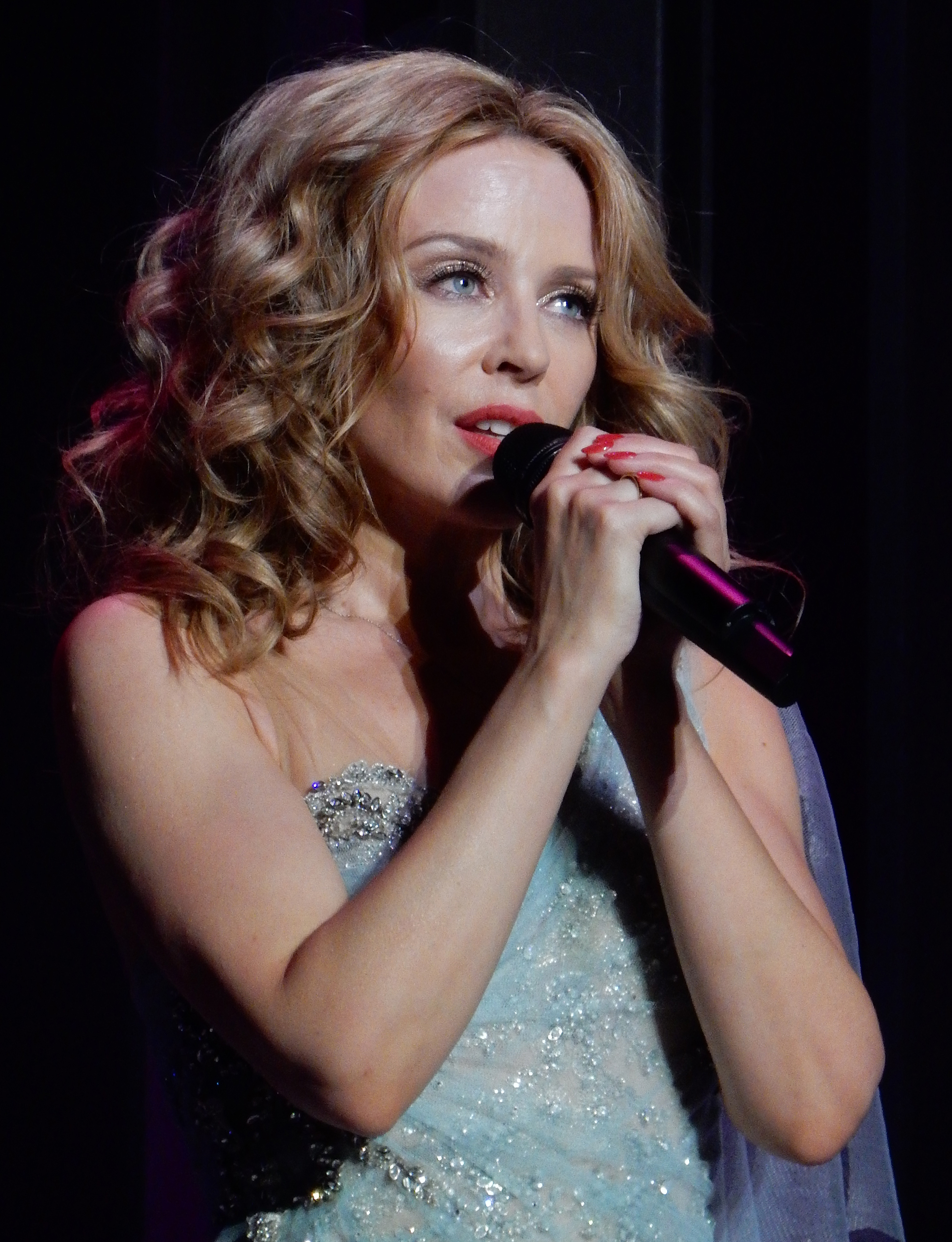 Kylie Minogue - Kiss Me Once Tour - Manchester - 26.09.14. - 154